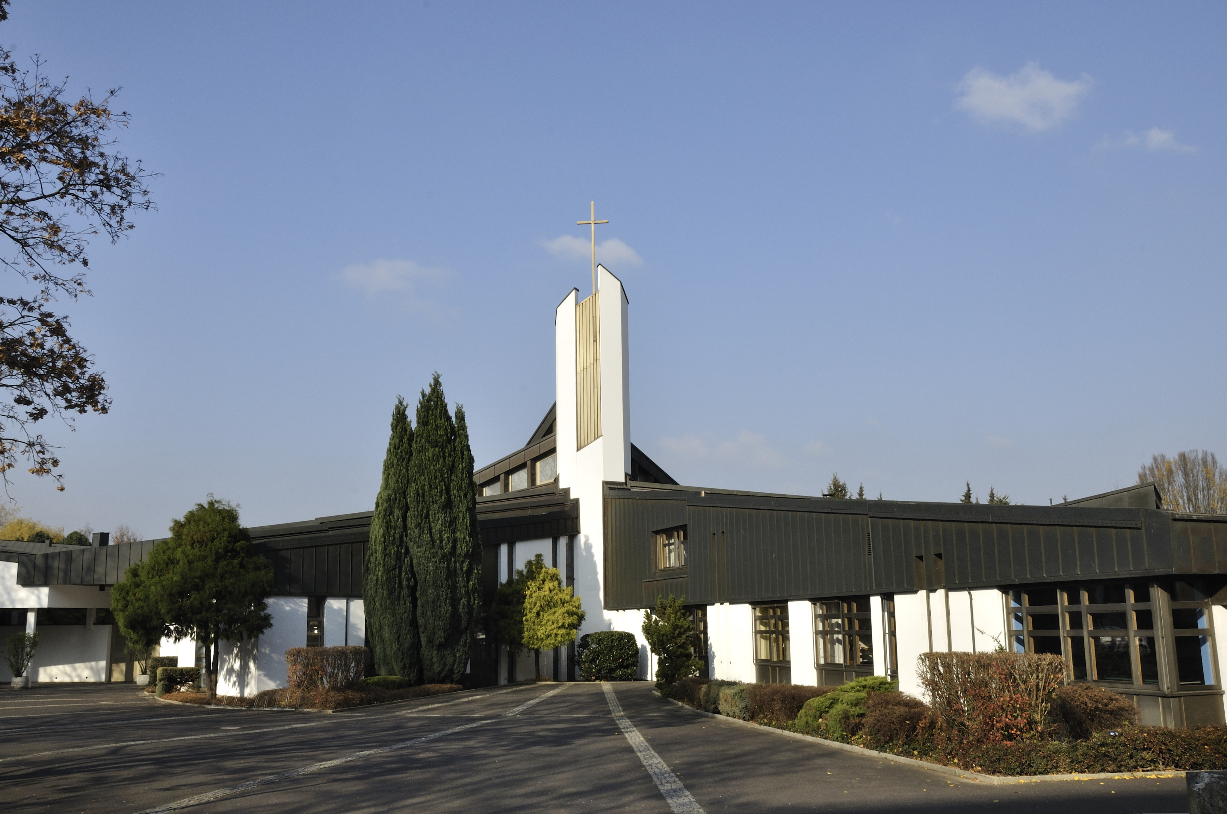 Kath. Pfarrkirche Expositurkirche St. Johannes mit Pfarrheim und Jugendzentrum